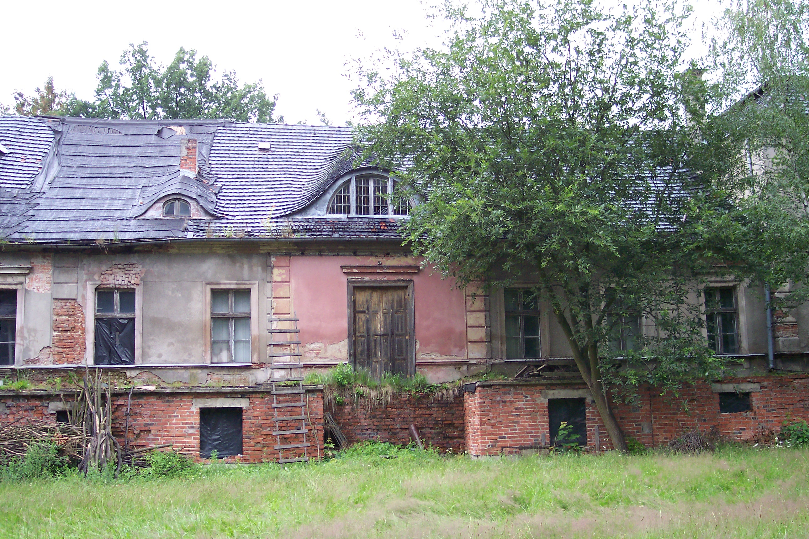 Pałac w Sierakowie Śląskim